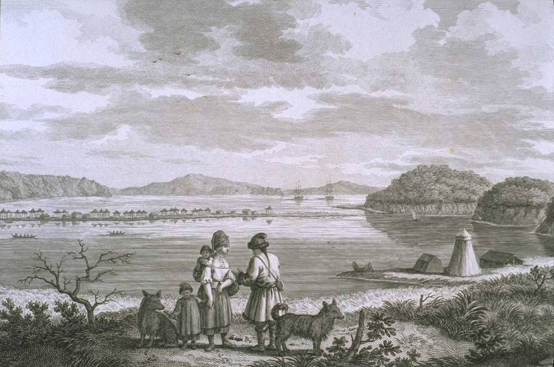 Vue des environs de Petropavlosk en 1787, lors de l'escale de l'expédition La Pérouse.